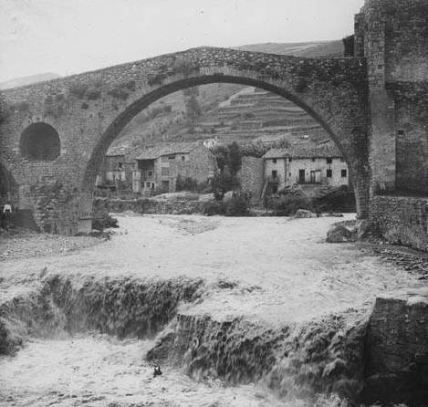 El Pont Nou de Camprodon amb el riu Ter i cases al fons. Frederic Bordas i Altarriba (ca. 1890)